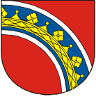 znak obce